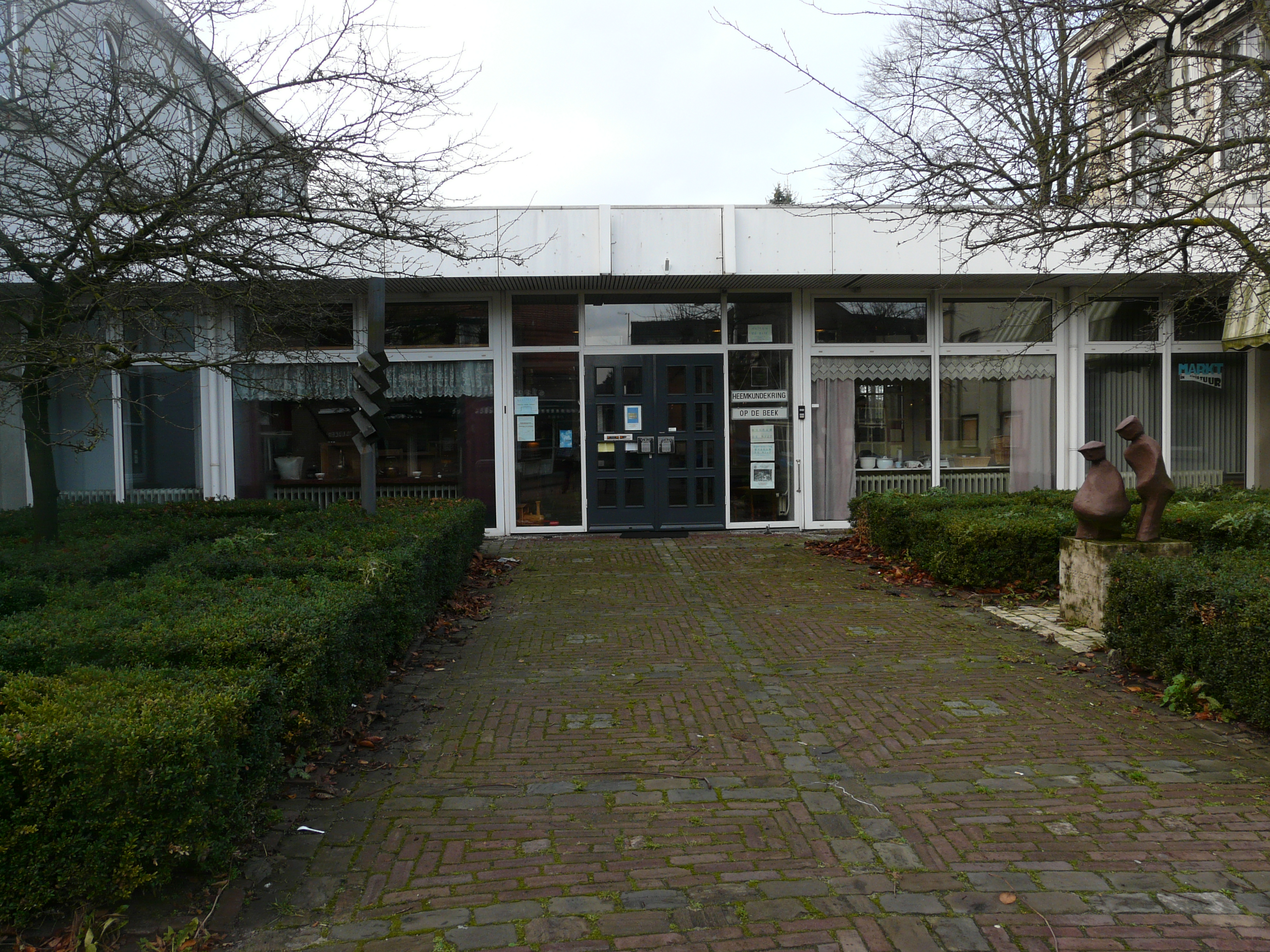 Zicht op de voorkant van de voormalige locatie aan de Markt van de Heemkundekring Op de Beek